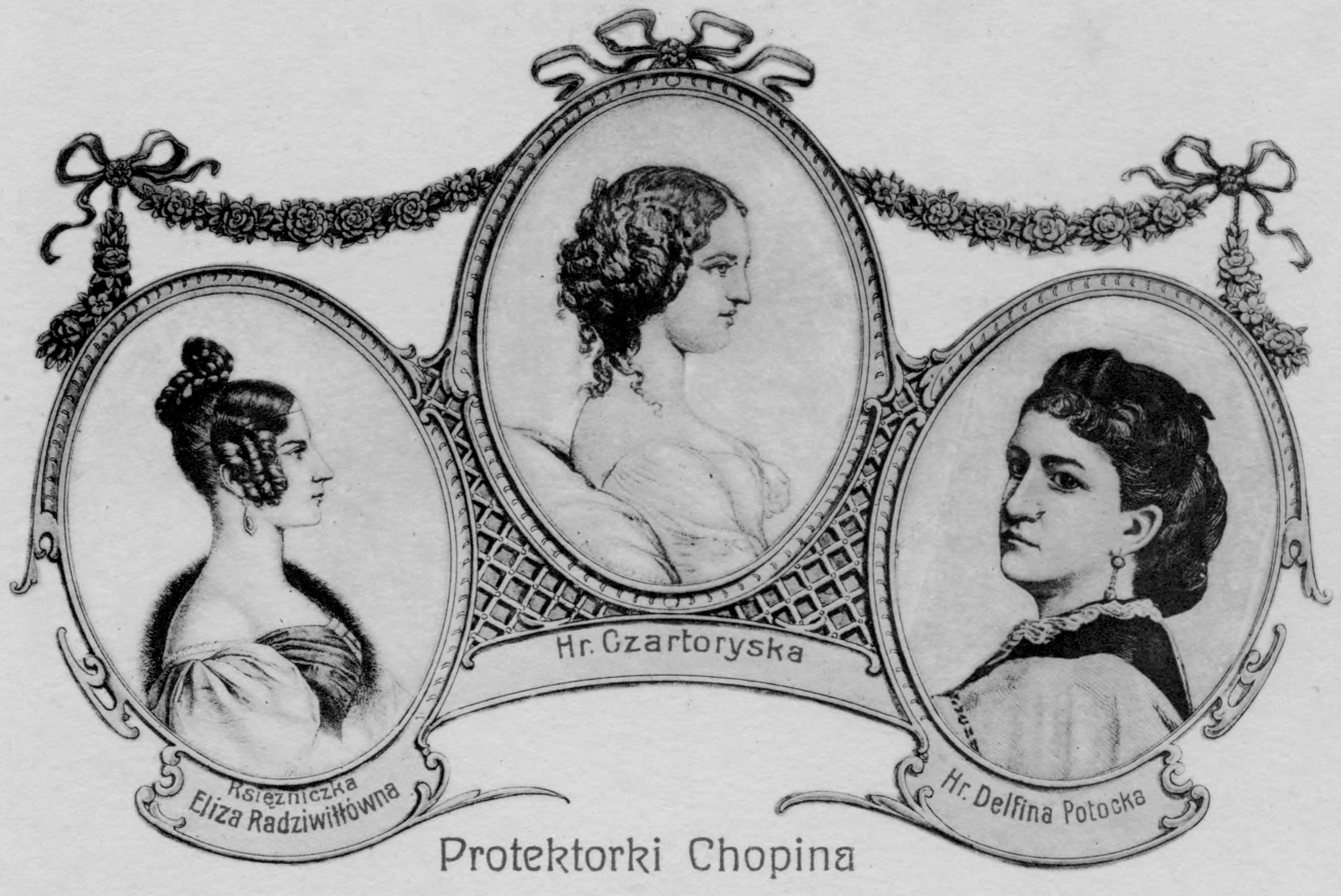 Protektorki Chopina. Eliza Radziwiłłówna, Marcelina Czartoryska, Delfina Potocka